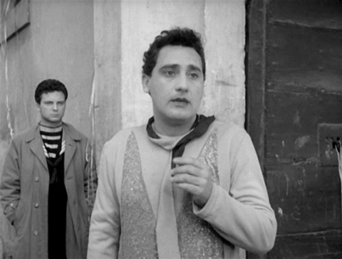 Screenshot del film I vitelloni (1953)